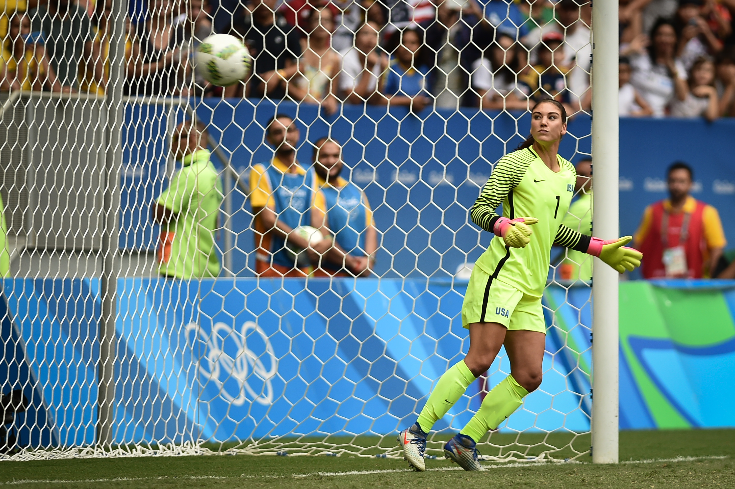 Estádio Nacional de Brasília Mané Garrincha, Brasília, DF, Brasil, 12/8/2016 Foto: Andre Borges/Agência Brasília. Estados Unidos e Suécia jogam nesta sexta-feira (12), no Estádio Mané Garrincha, pelas quartas de final do futebol feminino na Olimpíada 2016.